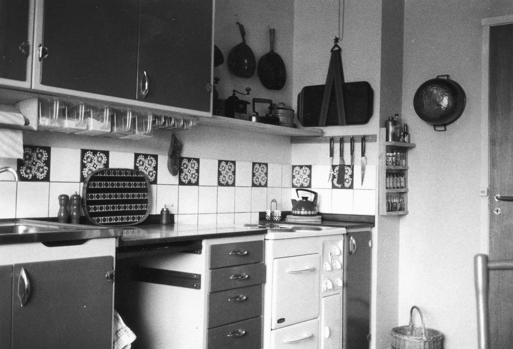 Svensk standardkök från 1960-talets slut